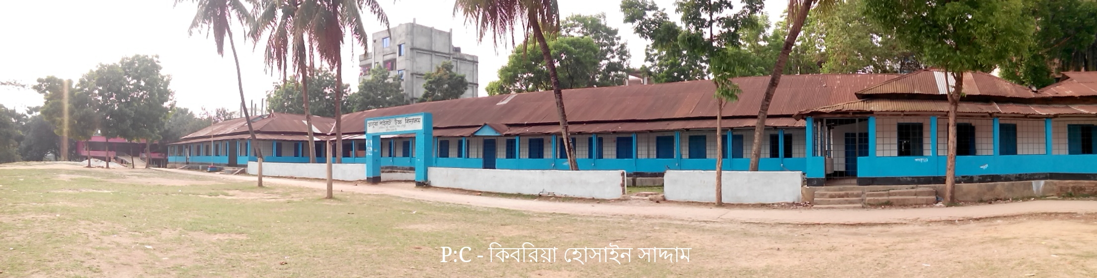 ভালুকা পাইলট উচ্চ বিদ্যালয় , ভালুকা ময়মনসিংহ